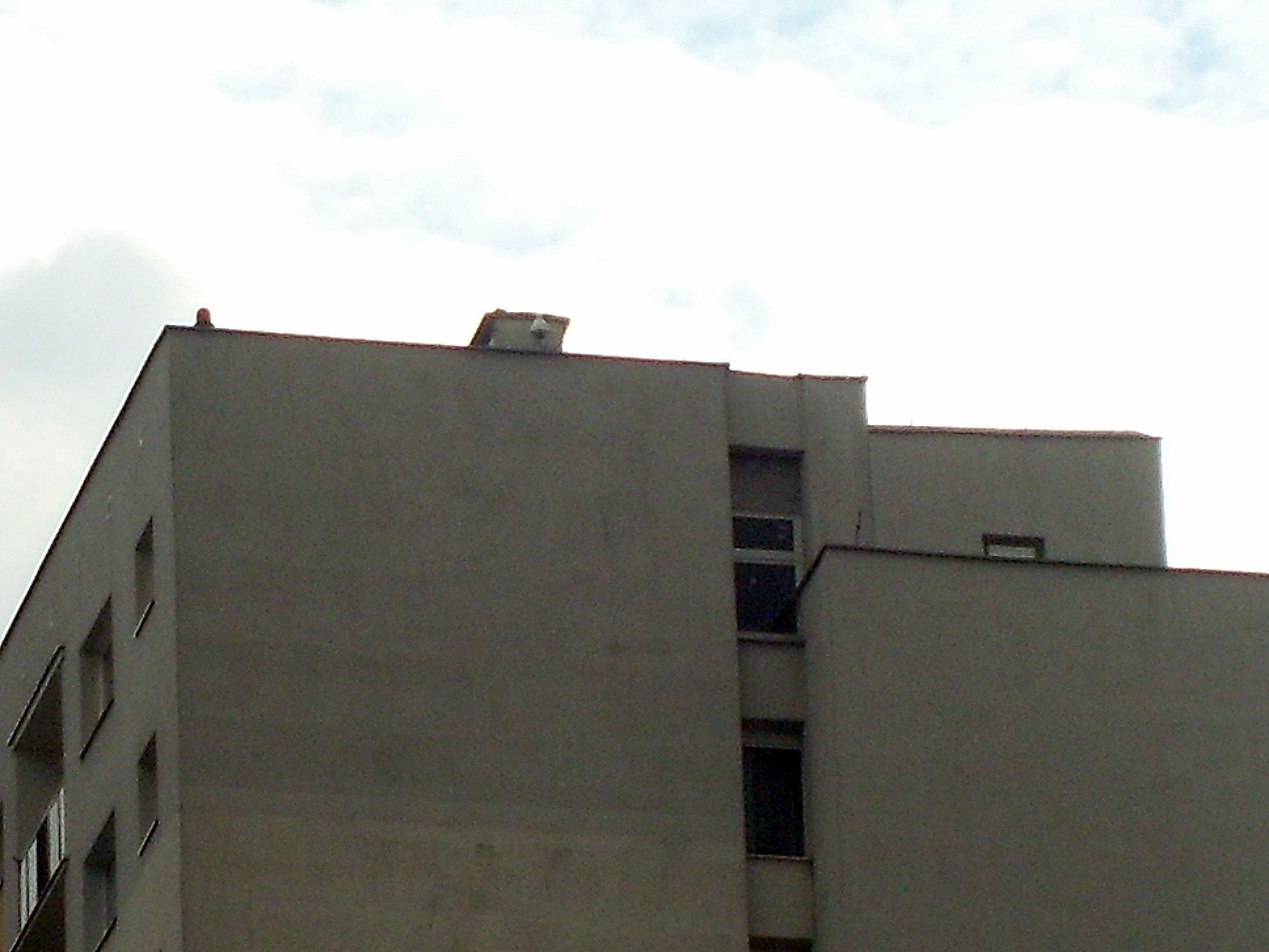 Rondo Rataje - kamera skierowana na rondo, obraz emitowany w lokalnej TV kablowej